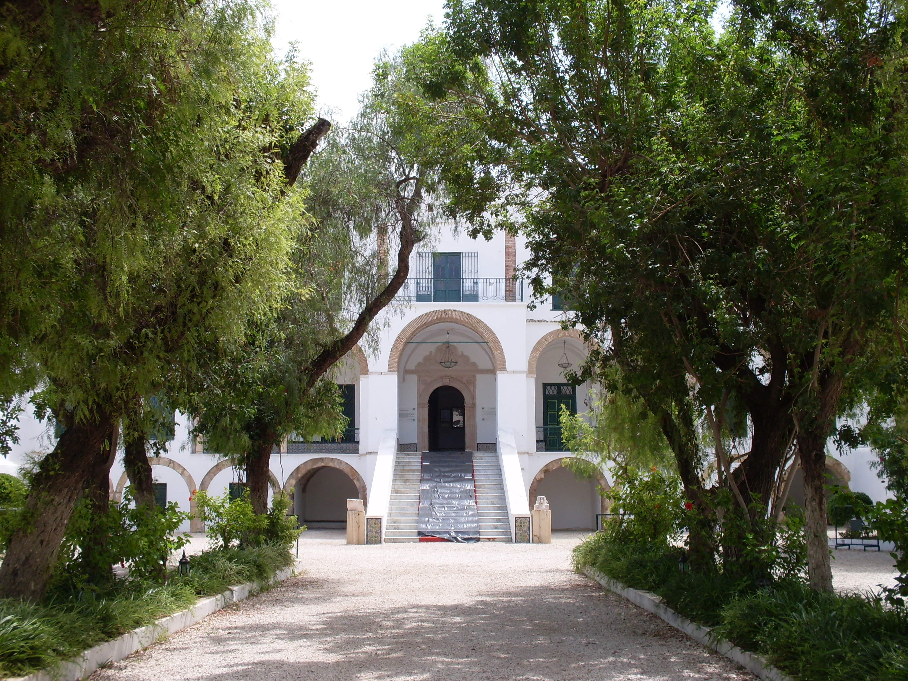 Entrée du palais Kobbet Ennhas Manouba Tunisie